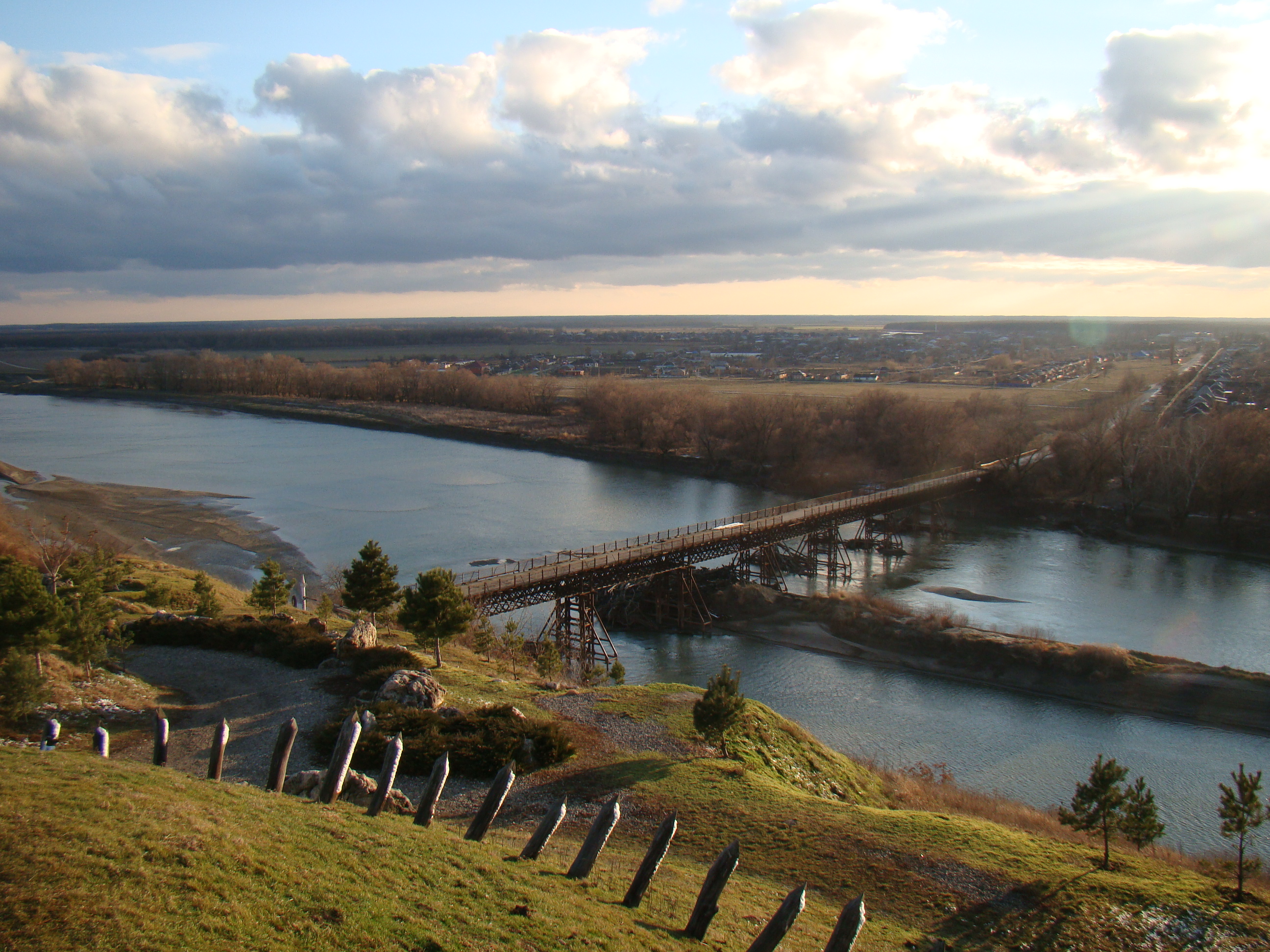 Norsk (nynorsk): Kuban ved Ust-Labinsk